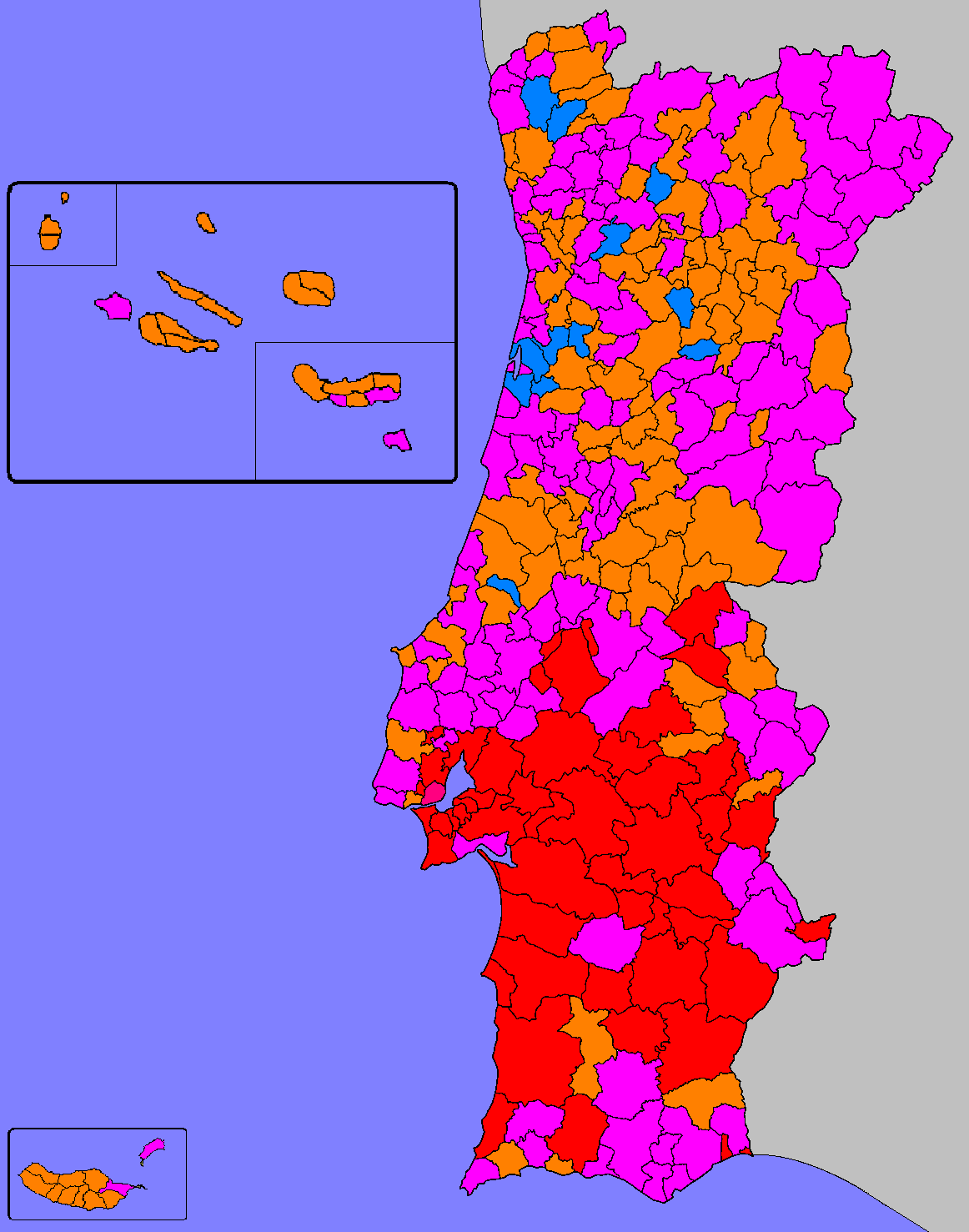 Mapa ilustrativo do partido mais votado por Concelho (Câmara Municipal)